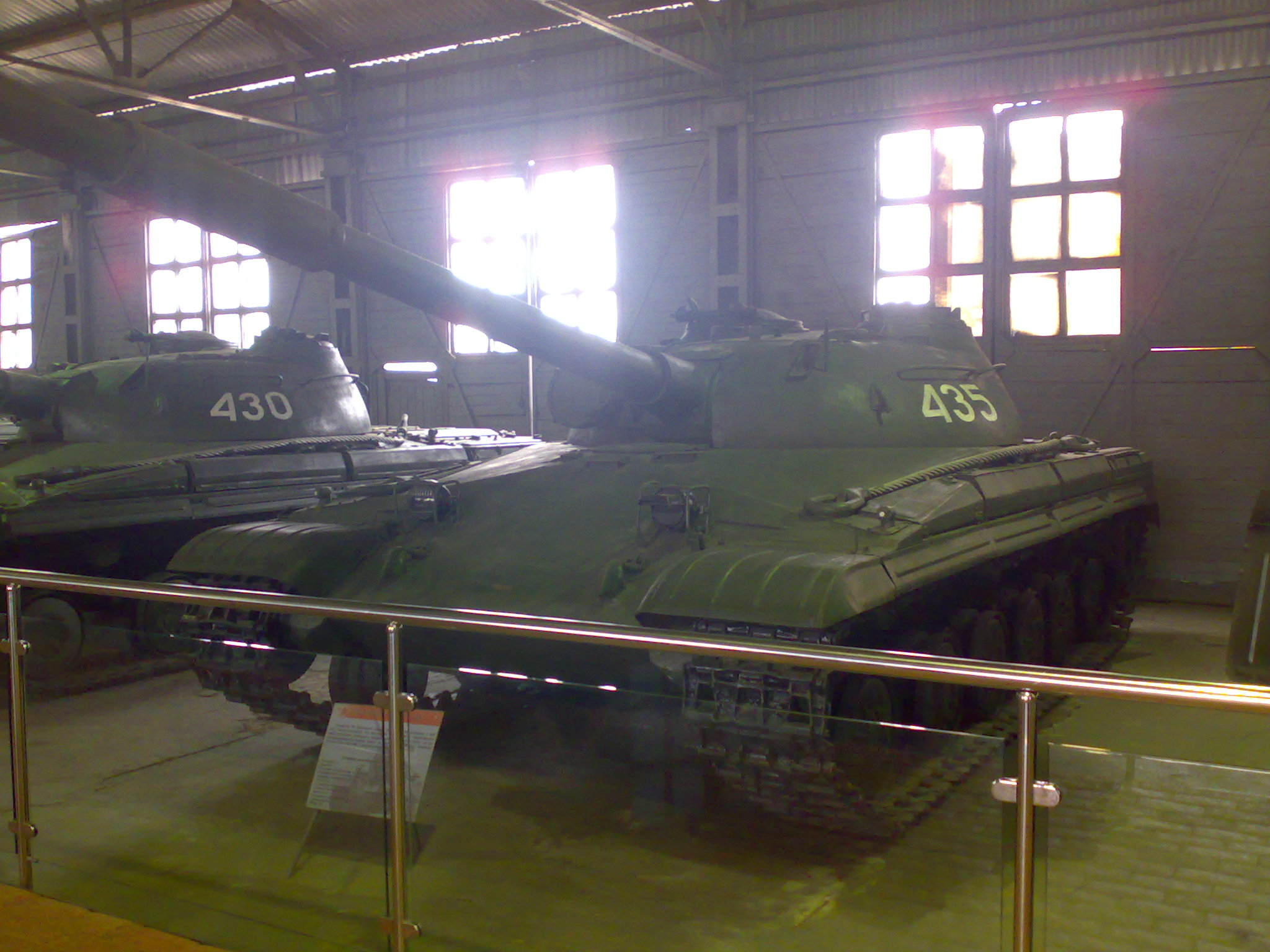 Опытный танк Объект 435 в Бронетанковом музее Кубинки.